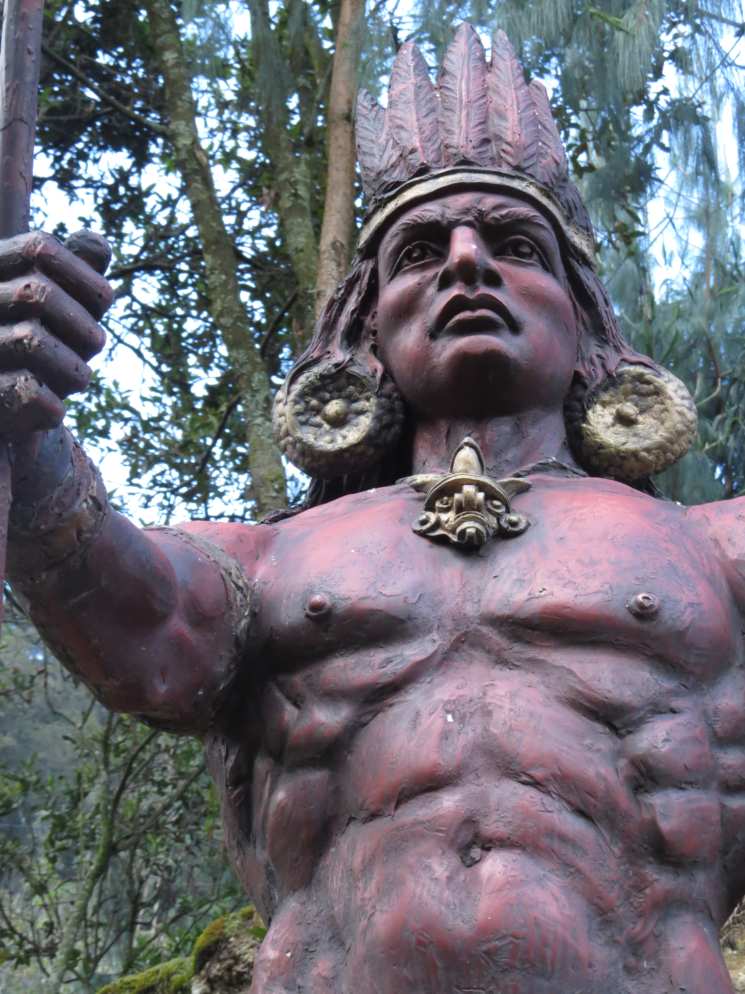 Estatua representativa a los indígenas.